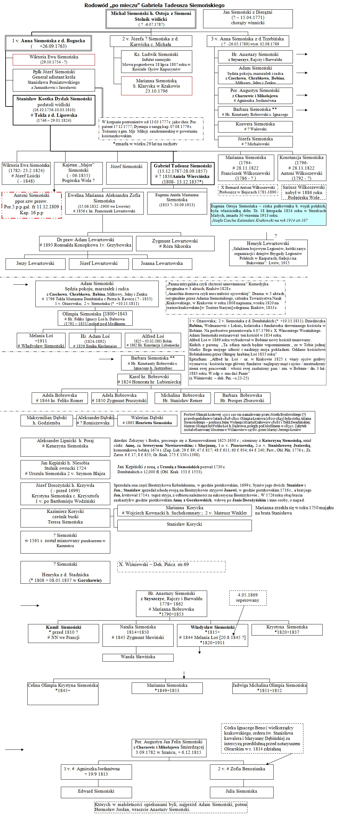 Rodowód Gabriela Tadeusza Siemońskiego